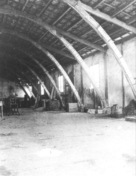 Cooperativa Obrera Mataronense